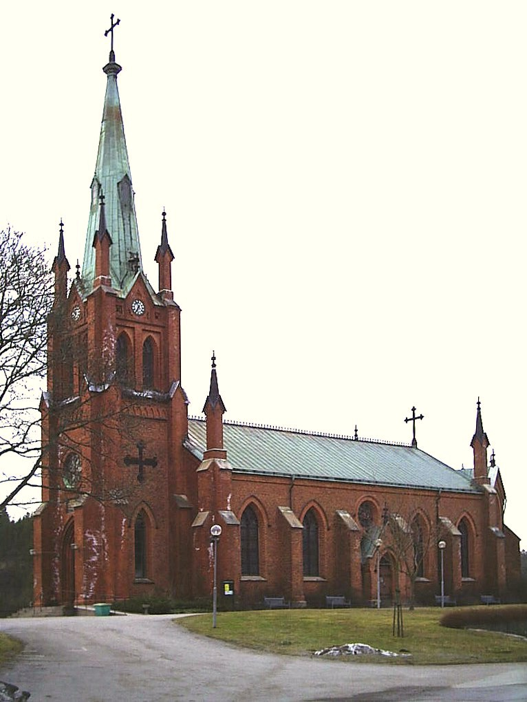 Trollhättans kyrka, fotograferad av Tubaist.